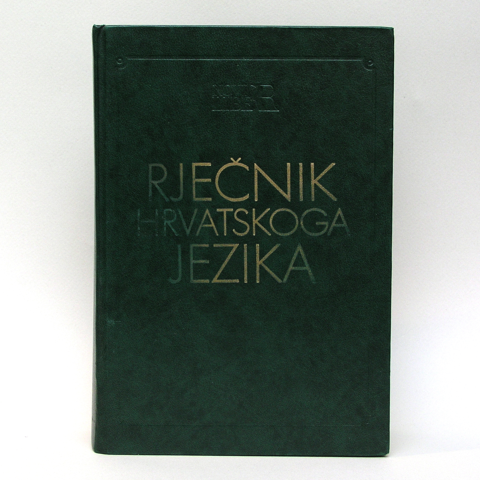 Rječnik hrvatskoga jezika, Vladimir Anić, Novi Liber, 1991., ISBN 86-361-0771-7